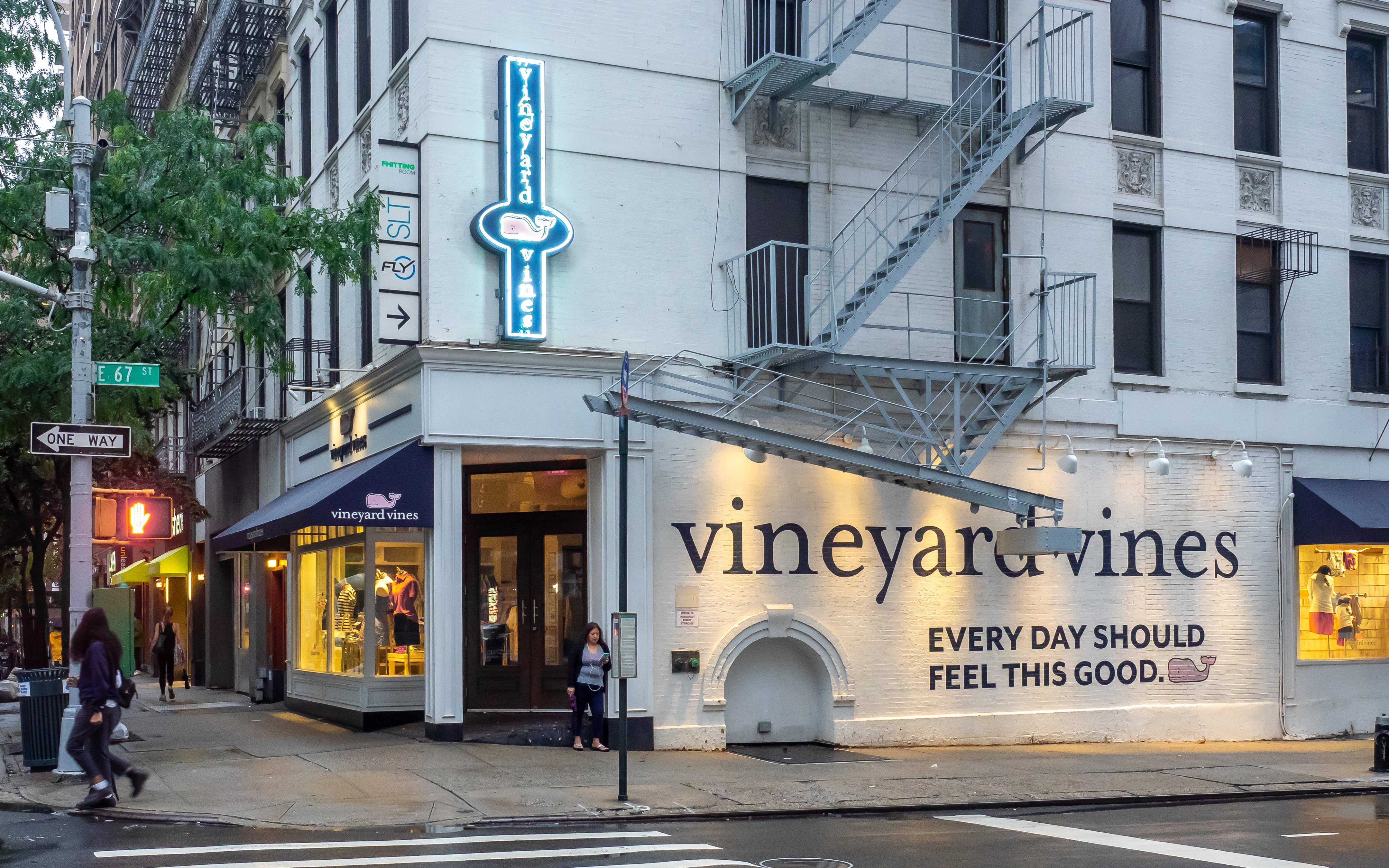 Upper East Side, NYC